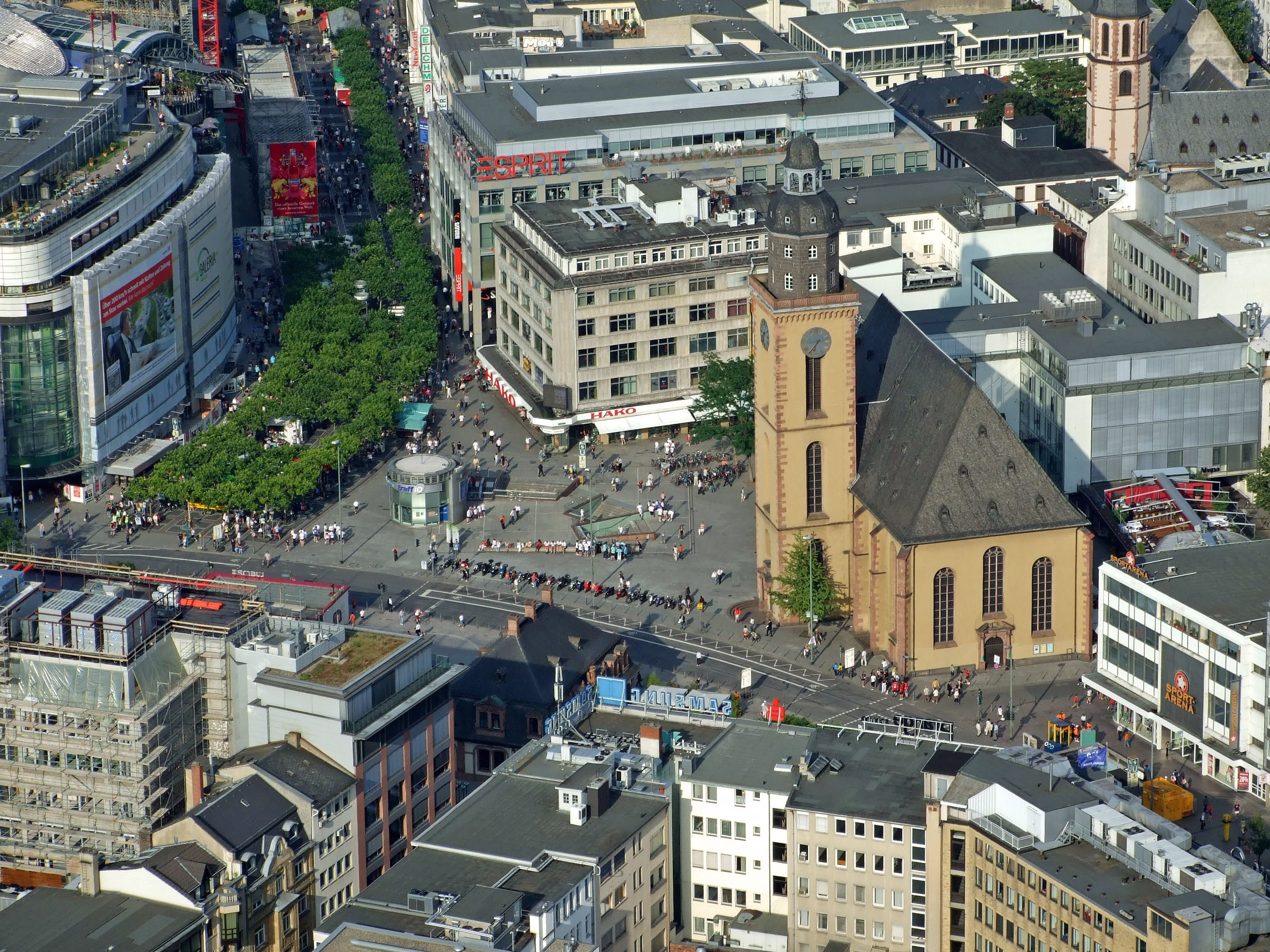 Katharinenkirche, an der Frankfurter Hauptwache vom MAIN TOWER aus